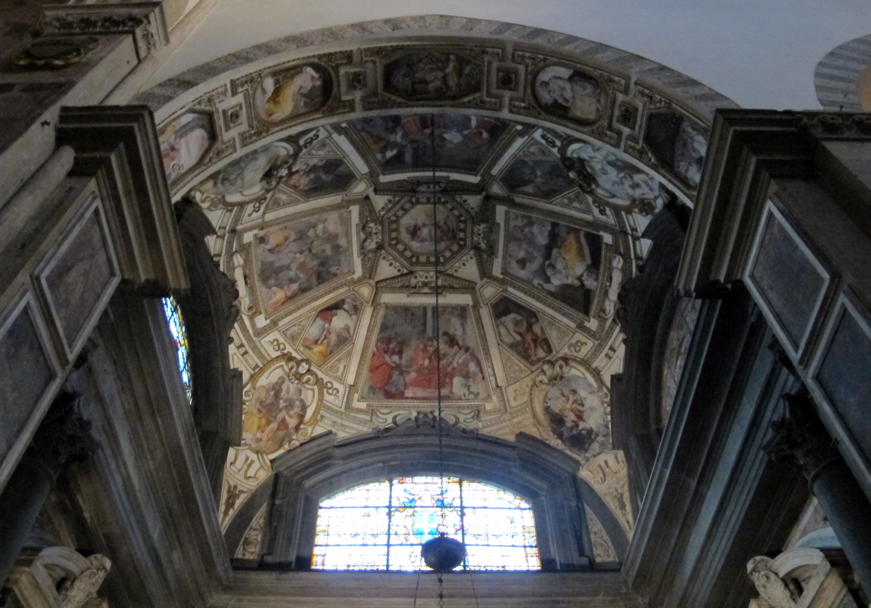 Cappella gaddi di smn 07 volta di alessandro allori